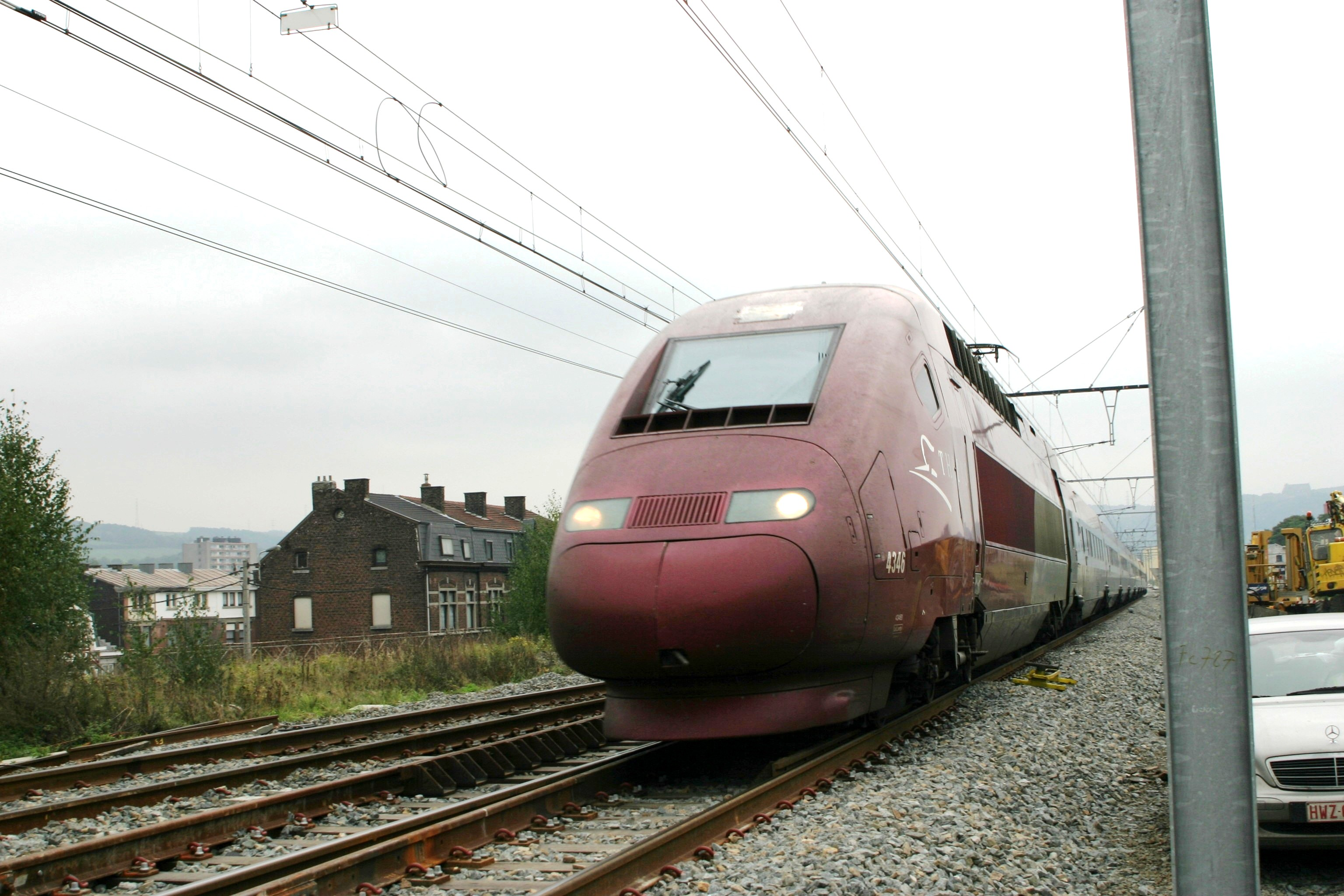 Den Thalys den 12 Oktober um 13.30 kënnt aus Richtung Verviers a fiert an d'Gare vu Léck eran. Foto gouf gemach zu Angleur op Linn 36 nieft der Ofzweigung vun der Linn op Marche (Linn 43), um KP. 102,925.